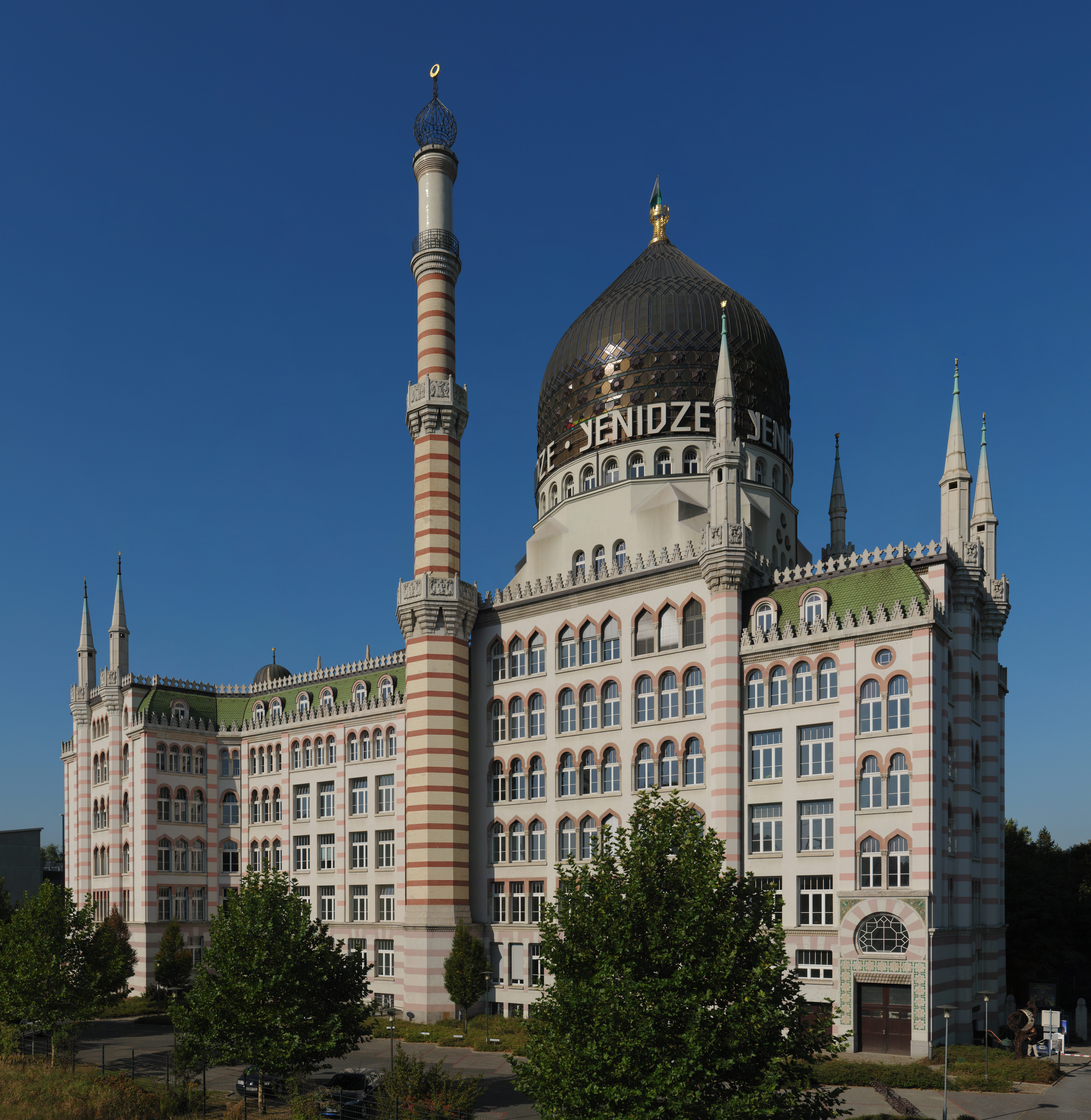 Yenidze Dresden, Germany